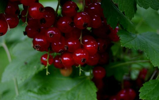 Ribes rubrum